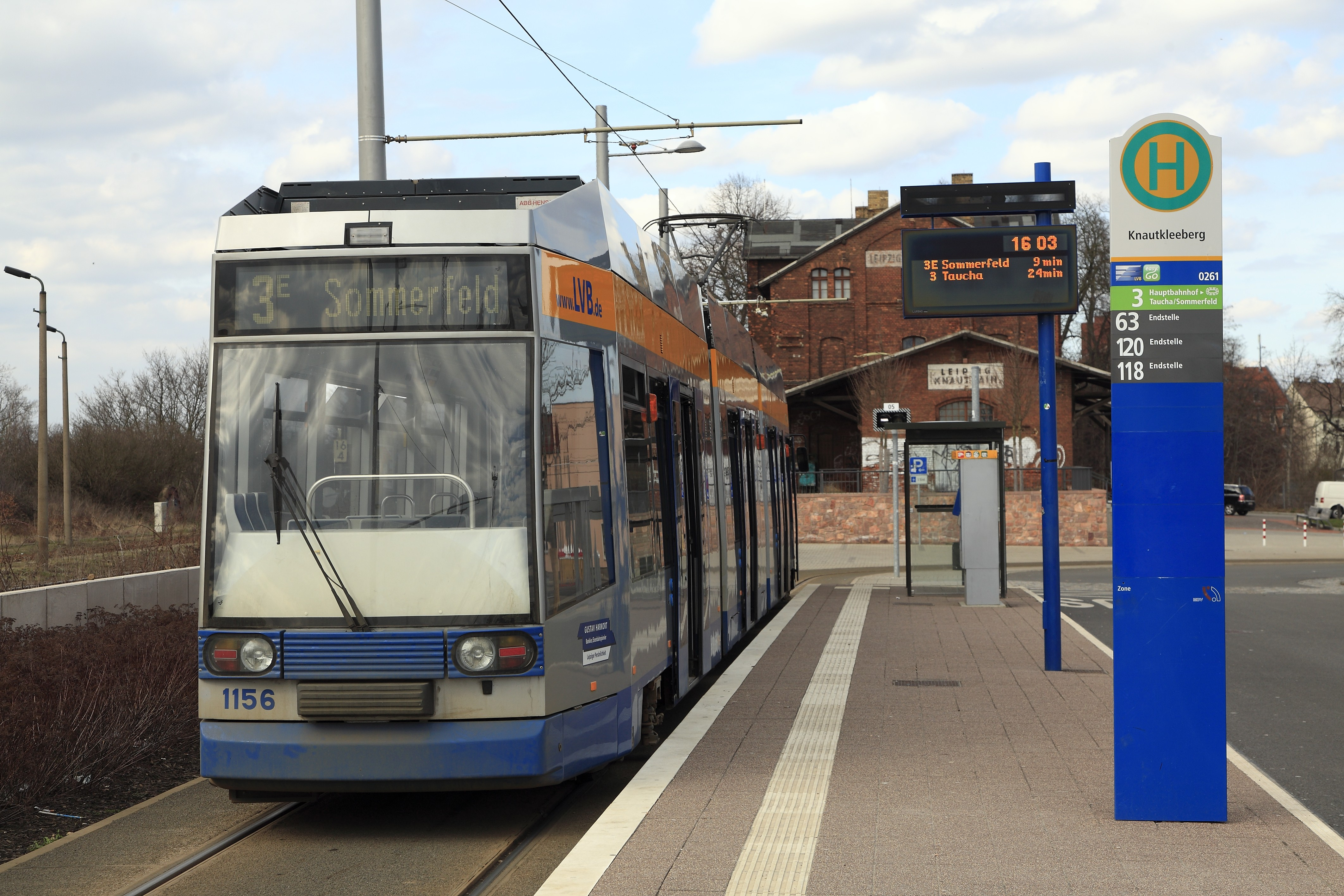 NGT8, Typ 36 am Abfahrtsbahnsteig, Nachschuss. Die andere Kante des Bahnsteiges wird von den Bussen benutzt. Die Züge der Linie 3E verkehren nach Sommerfeld statt Taucha. Warum man beide Zugläufe nicht wie vorher nicht mit den Liniennummern 3 und 13 unterscheidet, wissen wohl auch die Planer von LVB und MDV nicht. Ganz links liegen die Bahnsteige der Fernbahn, Strecke Leipzig–Probstzella. Die Bahnsteige wurden noch nicht umgebaut, der Zwischenbahnsteig ist weiter in Betrieb.